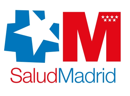 Fotografía del logotipo del Servicio Madrileño de Salud de Madrid (SERMAS). Tomada en el Centro de salud Miguel de Cervantes de Alcalá de Henares (Comunidad de Madrid - España).